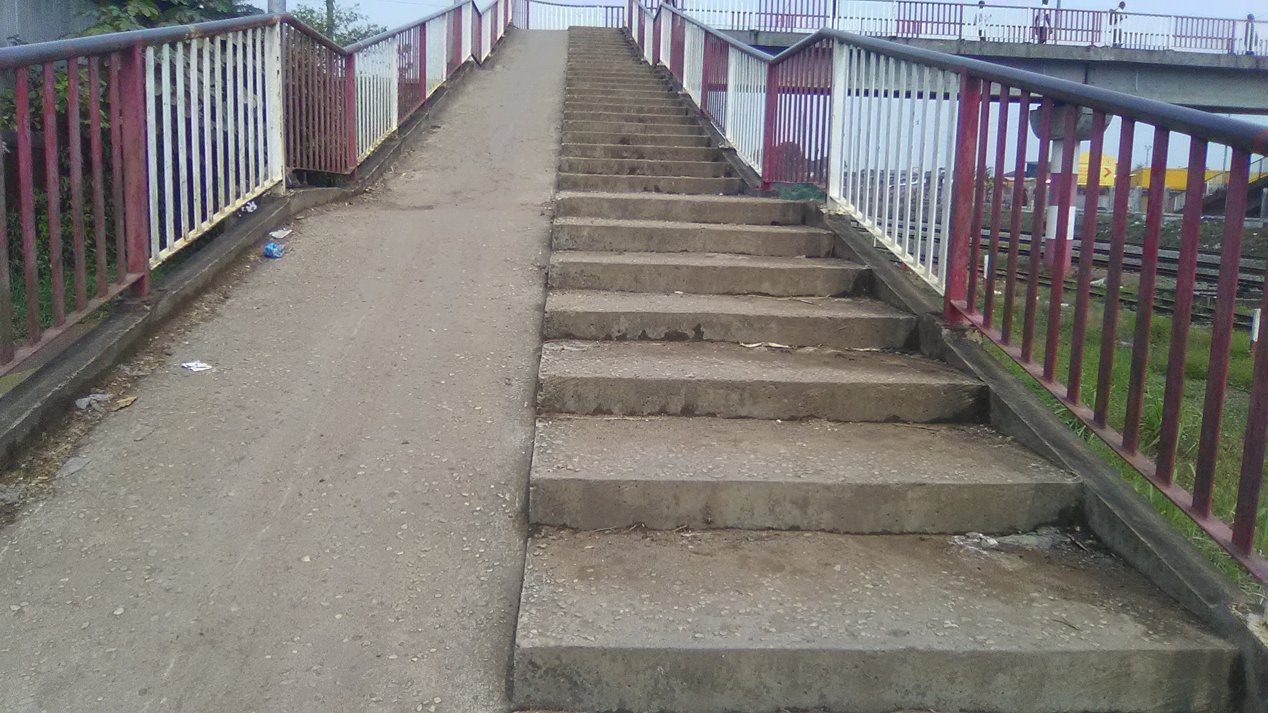 Les handicapés se déplaçant par les fauteuils roulants sont désormais pris en compte dans l'aménagement des voies d'accès à certains endroits. This is an image with the theme "Africa on the Move or Transport" from: Cameroon